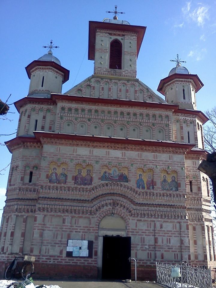 Biserica „Adormirea Maicii Domnului”